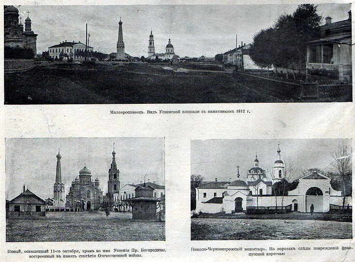 Россия. Малоярославец. Памятник-часовня Отечественной войне 1812 года и храмы. Фото 1912г.